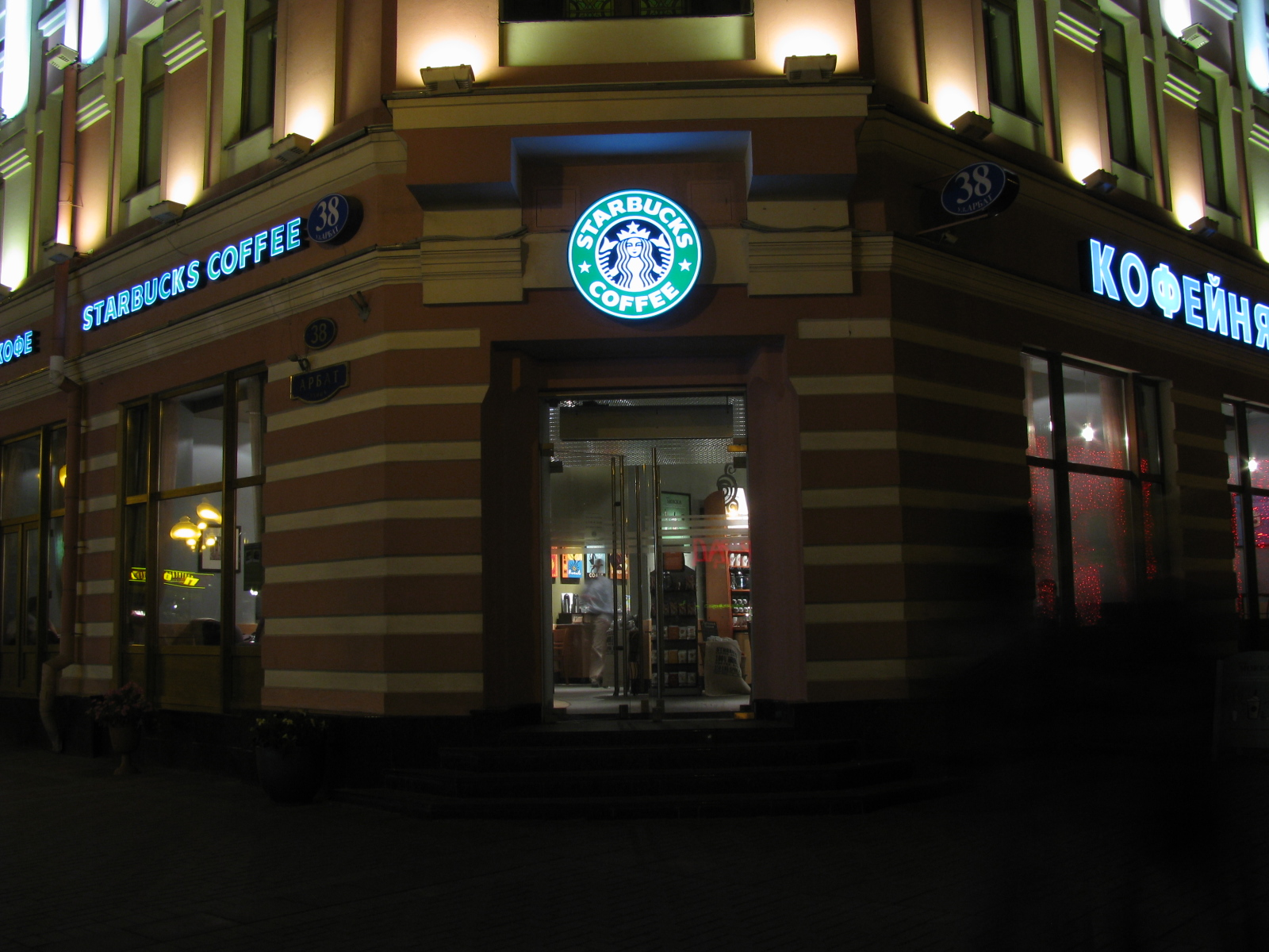 Кофейня Starbucks на Старом Арбате ( г. Москва )